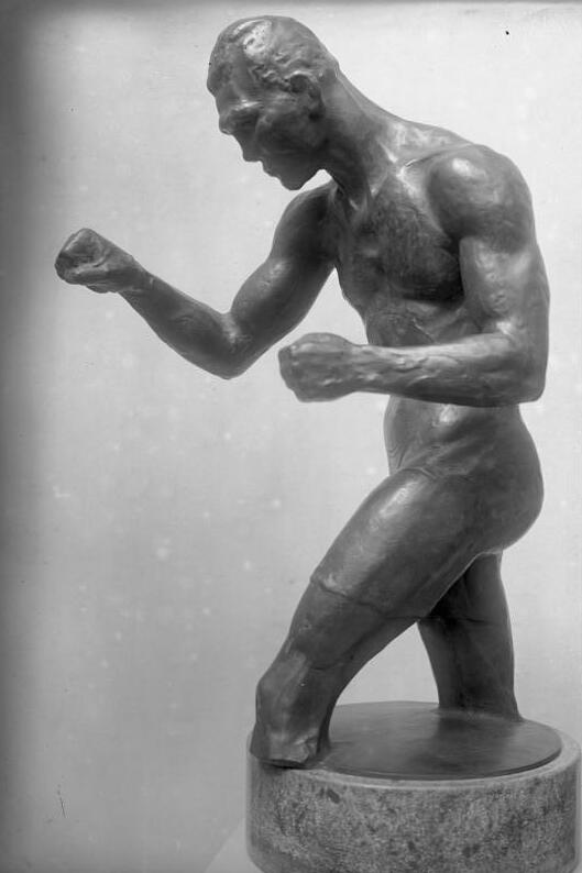 Triumpfsieg des deutschen Boxweltmeisters Max Schmeling in Amerika! In einem heroischen Kampf siegte Max Schmeling gegen den amerikanischen Schwergewichtsboxer Young Stribling entscheidend durch k.o. und verteidigte seinen bis dahin angezweifelten Weltmeistertitel ehrenvoll. Eine Plastik des Boxweltmeisters Max Schmeling! Plastik von Bildhauer Rudolf Belling hergestellt, zeigt Max Schmeling in seiner typischen Kampfstellung.